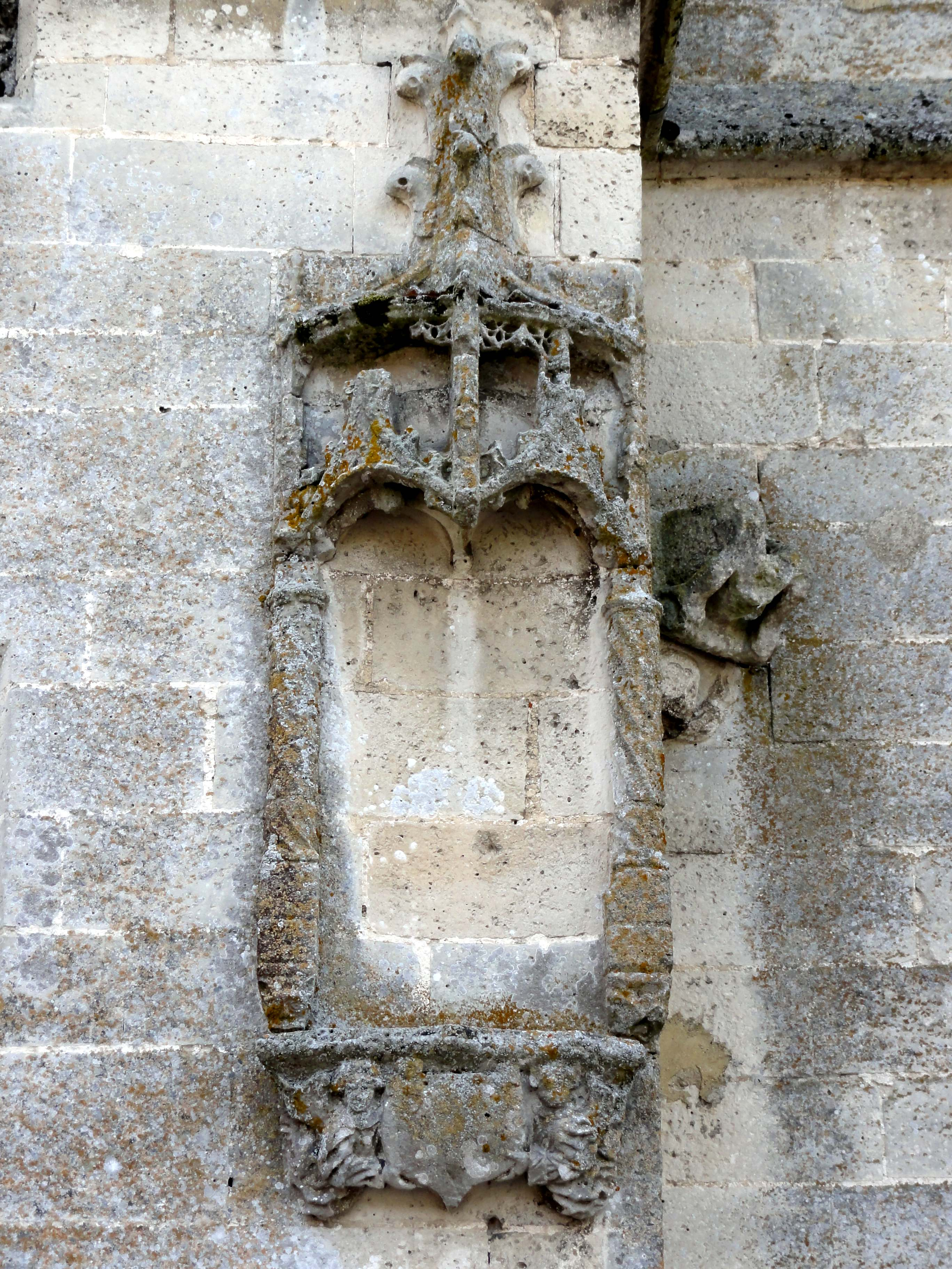 Façade occidentale (voir titre).